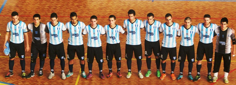 Foto da Seleção Argentina de Futebol de Salão no Mundial C-20 de 2014